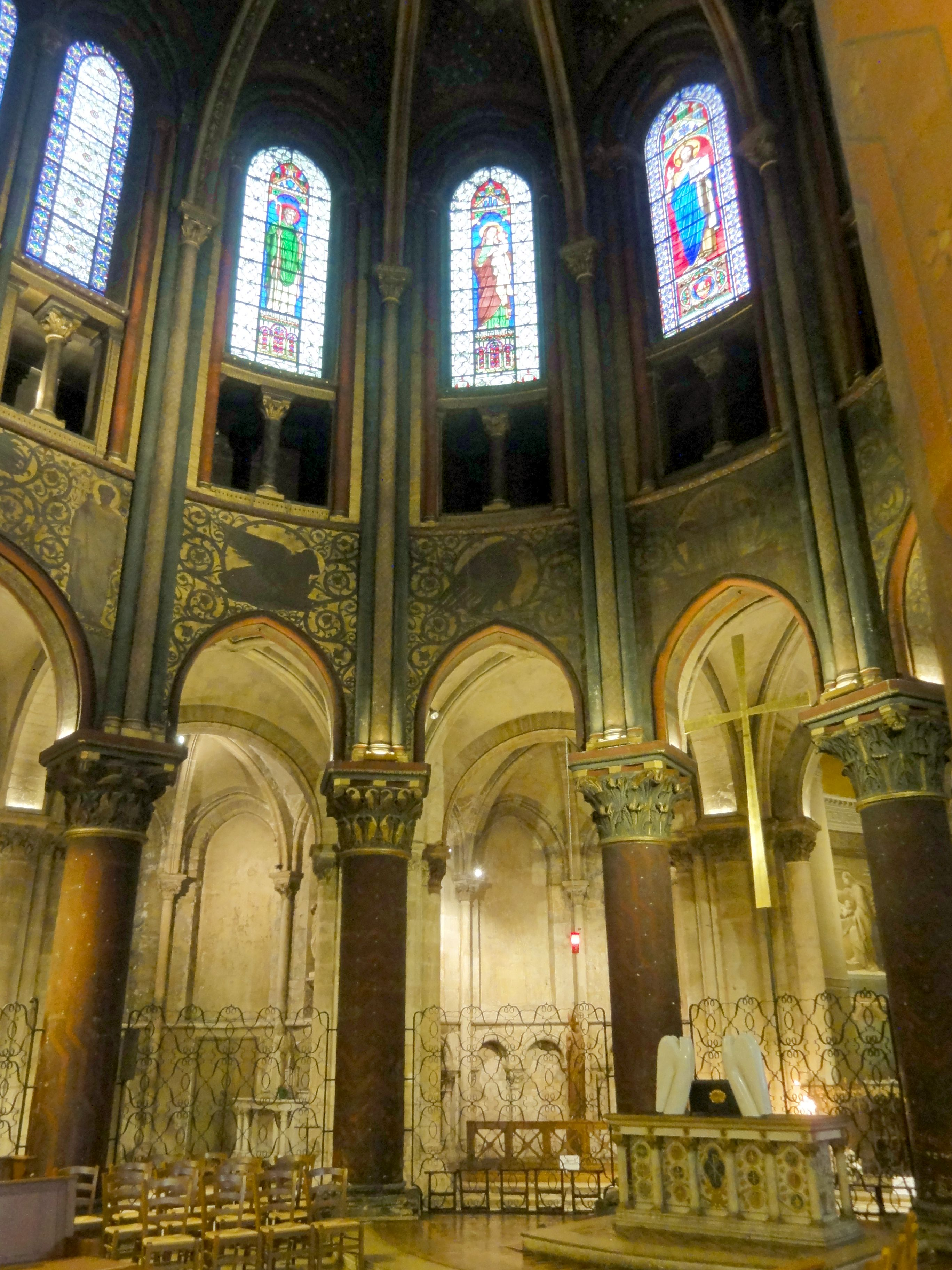 Chœur, rond-point de l'abside.